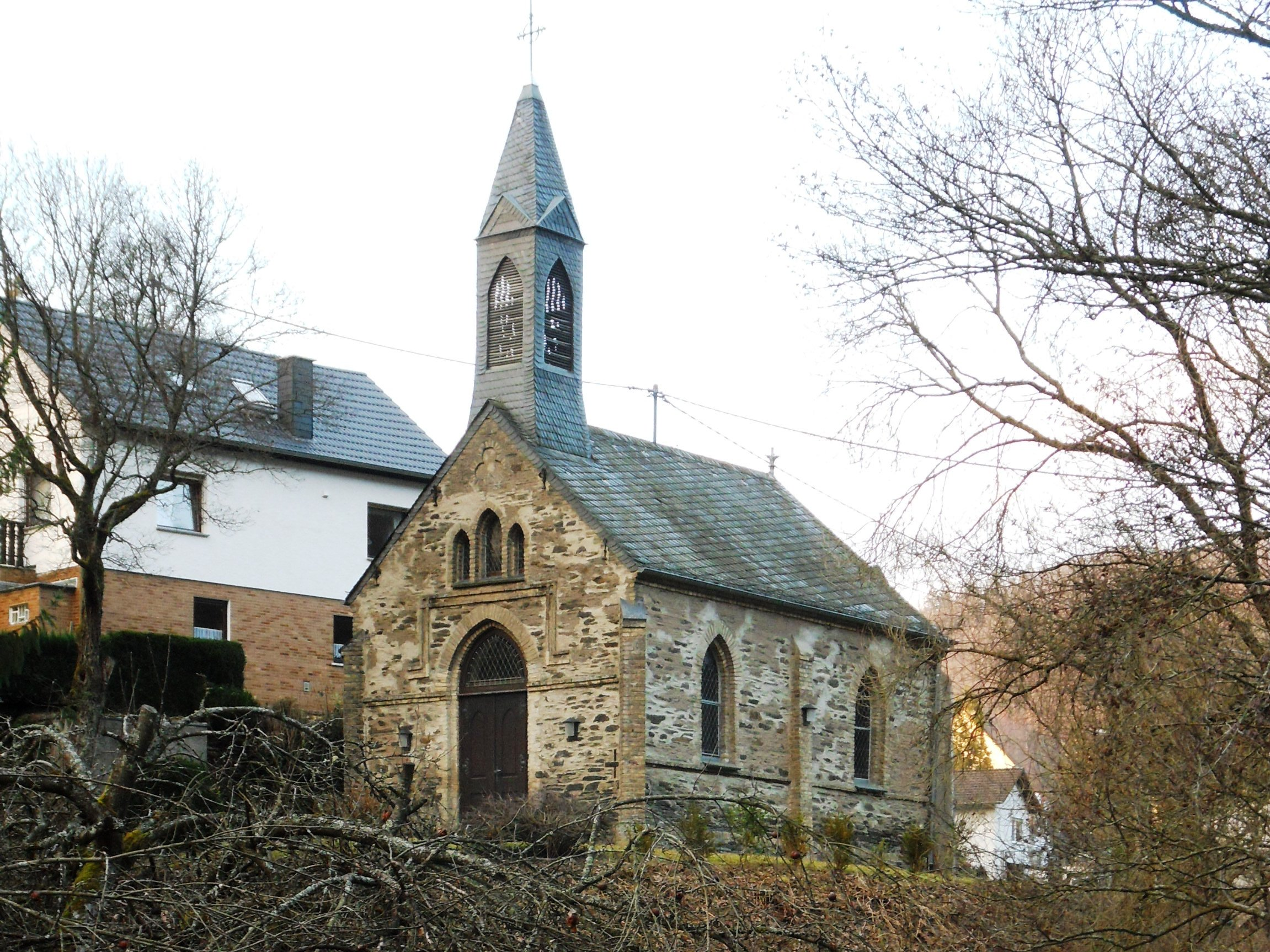 Blick von der Wisperstraße in Geroldstein im Taunus auf die denkmalgeschützte evangelische Kapelle